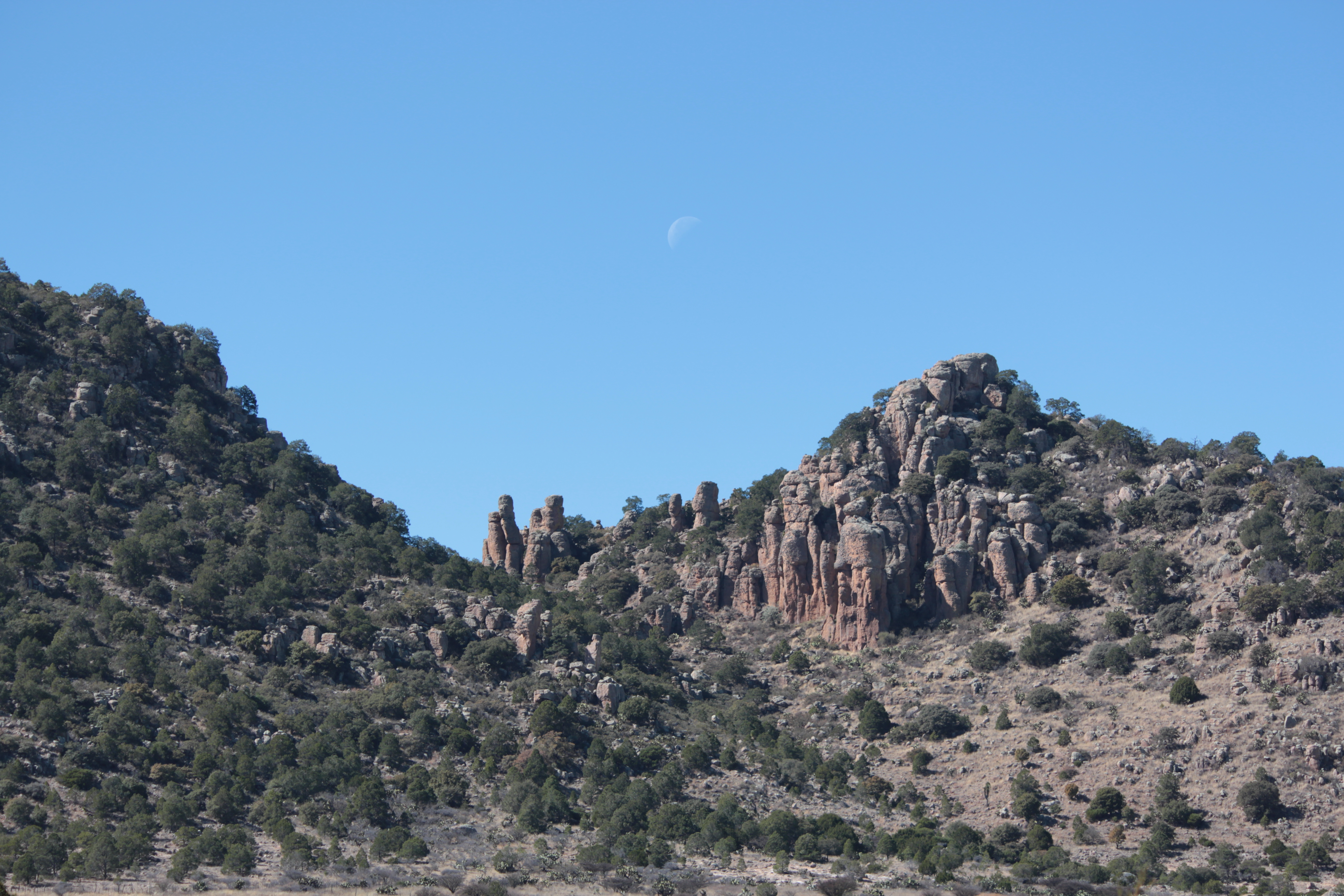 Sierra ubicada en el estado de Zacatecas, México